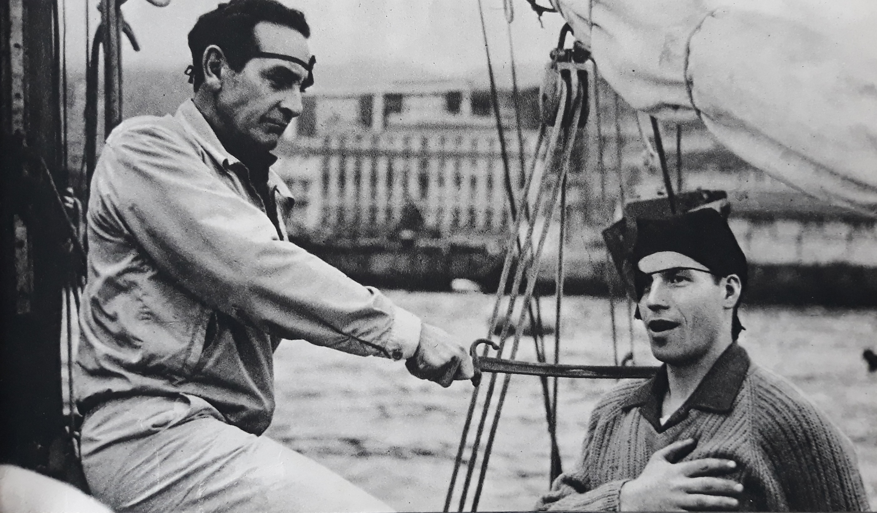 Uroczystość przyjęcia do grona "Bractwa Wybrzeża" w Valparaiso